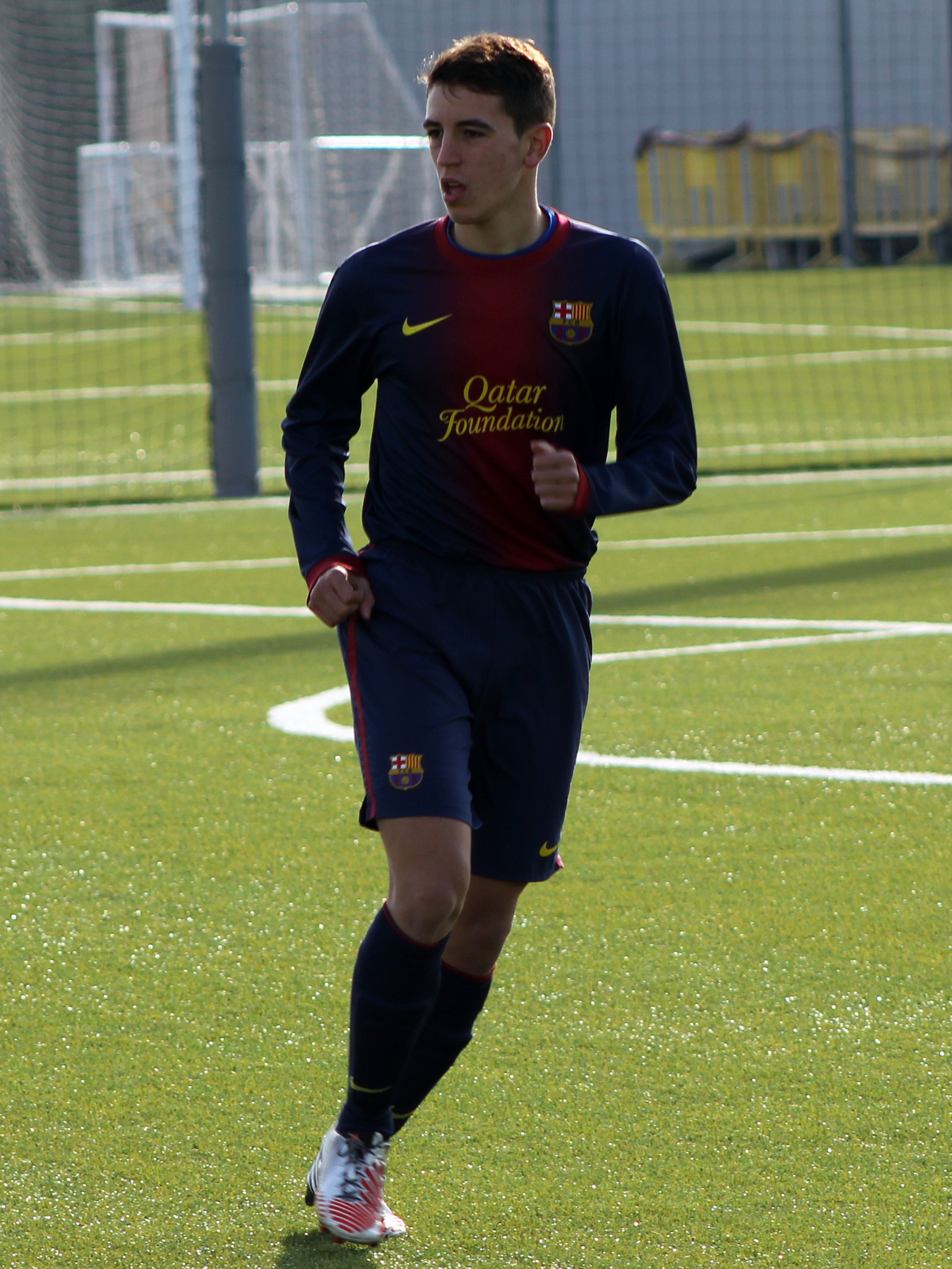 Foto realizada por Javier Segura (@castroquini)